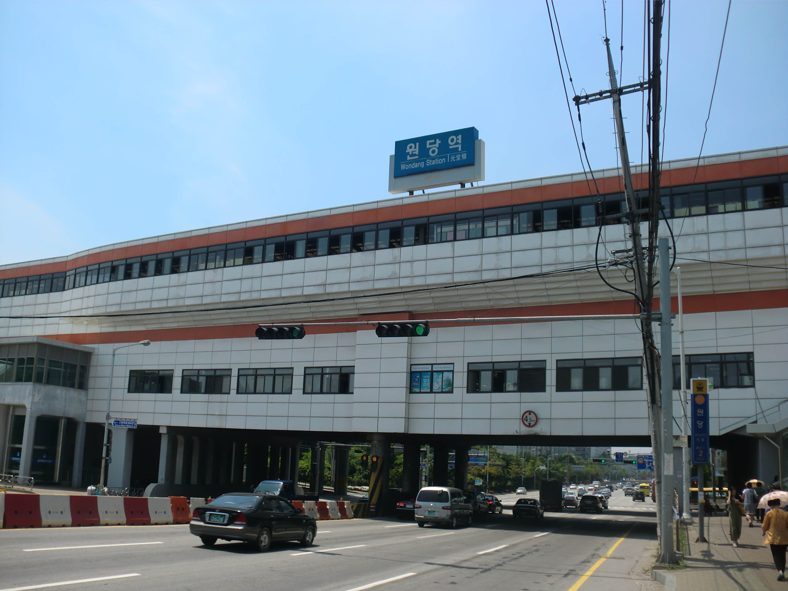 일산선 원당역